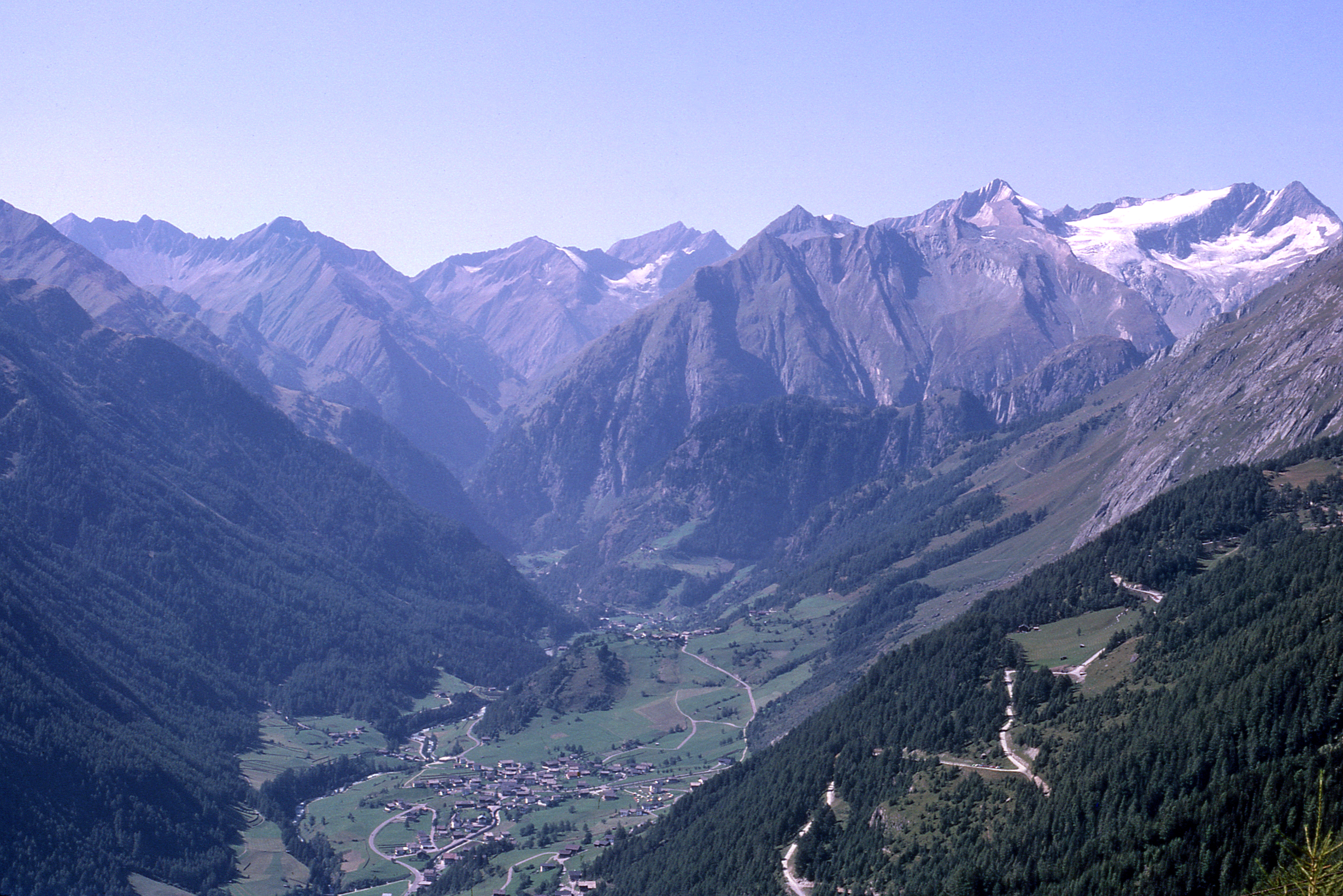 Venedigergruppe, Malhamspitzen, Malhamkeese, Quirl, von der Niljochhütte gesehen (1982) — Gipfel am rechten Bildrand: Nördliche Malhamspitze. Links davon, das schräg aufsteigende Felsband, Böse Wand, bekrönend: Mittlere Malhamspitze. Links des obersten, felsfreien Randes des Gletscherfeldes: Südliche Malhamspitze. Davon links die übernächste Erhebung (teilbefirnte Wand): Südlichste Malhamspitze. Nächstfolgender spitz zulaufender Gipfel (vor der rechten Flanke des bilddominanten, 3.251 m hohen Quirl): Malhamhorn.